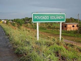 chegada de edilândia